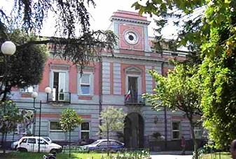 Arzano